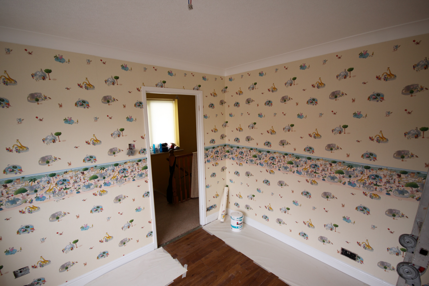 wallpaper & border